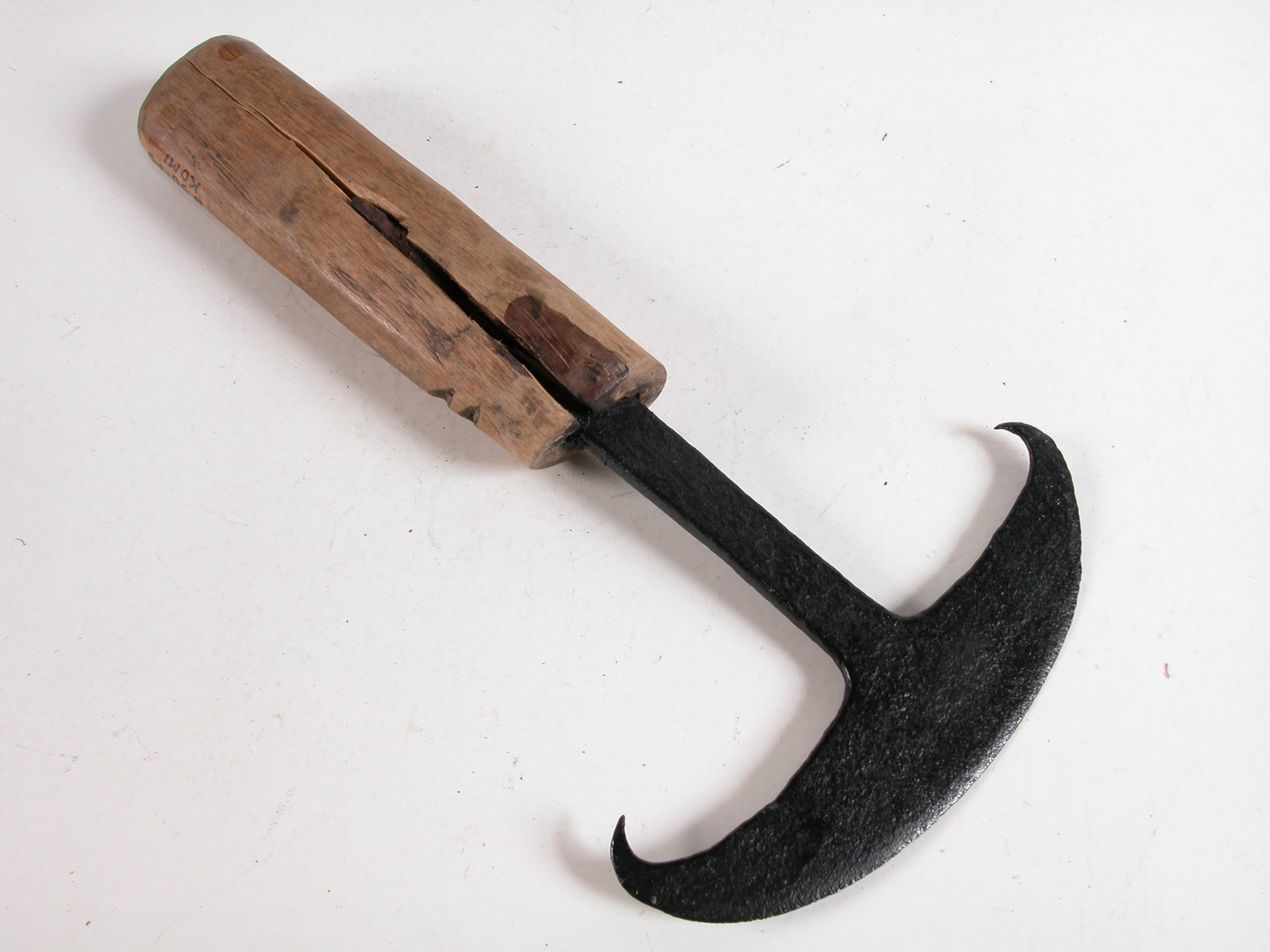 Vene; vabariik Komi, rajoon Sõsola, külanõukogu Kuratovo 1976 muuseumi kogumistegevus Vene; vabariik Komi, rajoon Sõsola, külanõukogu Kuratovo koguja: Peterson, Aleksei koguja: Kutsar, Vello üleandja: Sementina, Jelena muud eluloolised andmed sünd. 1920. a.